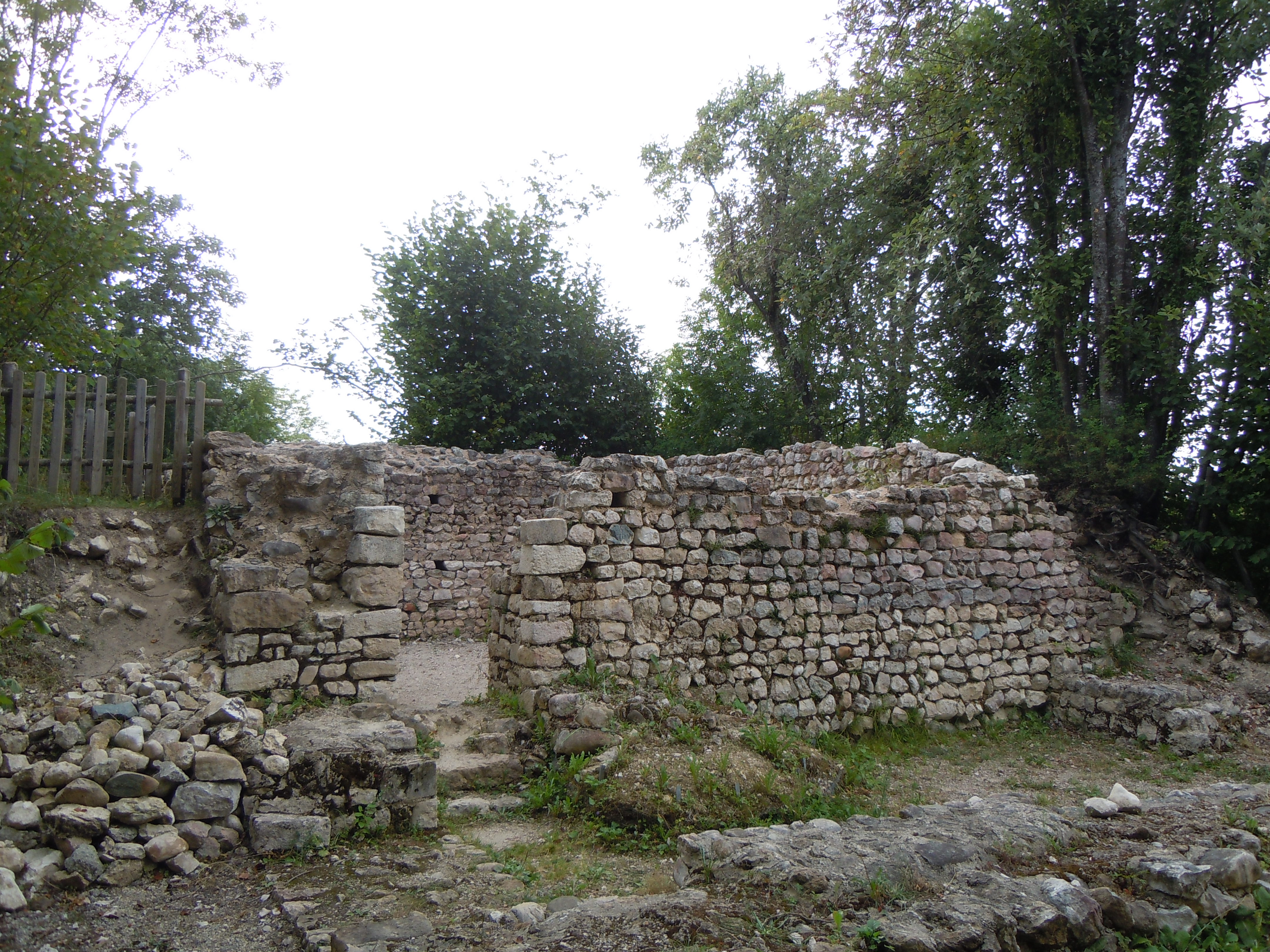 Ruine du château de Conspectus - Saint-Maurice de Rotherens - Savoie - France